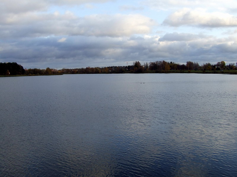 Ekrano gamyklos tvenkinys, Panevėžys, Lietuva.